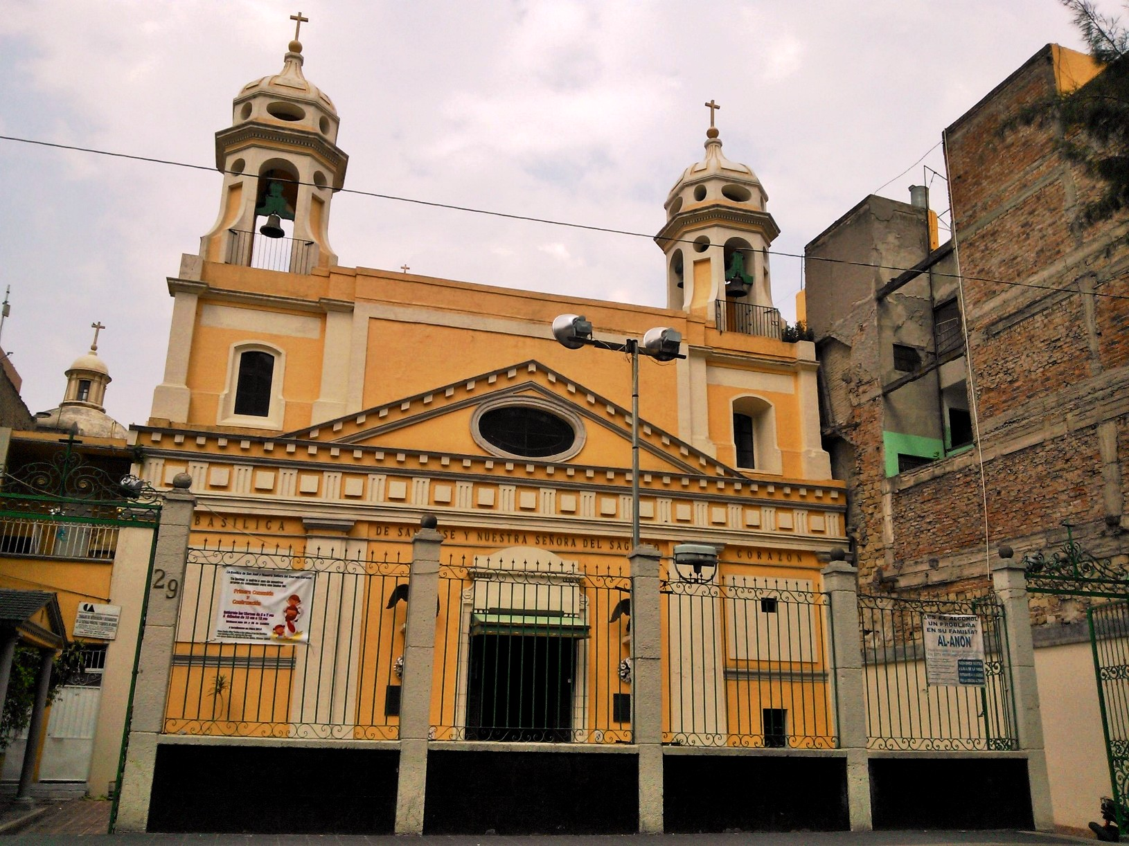 Basilica de San José Ciudad de México